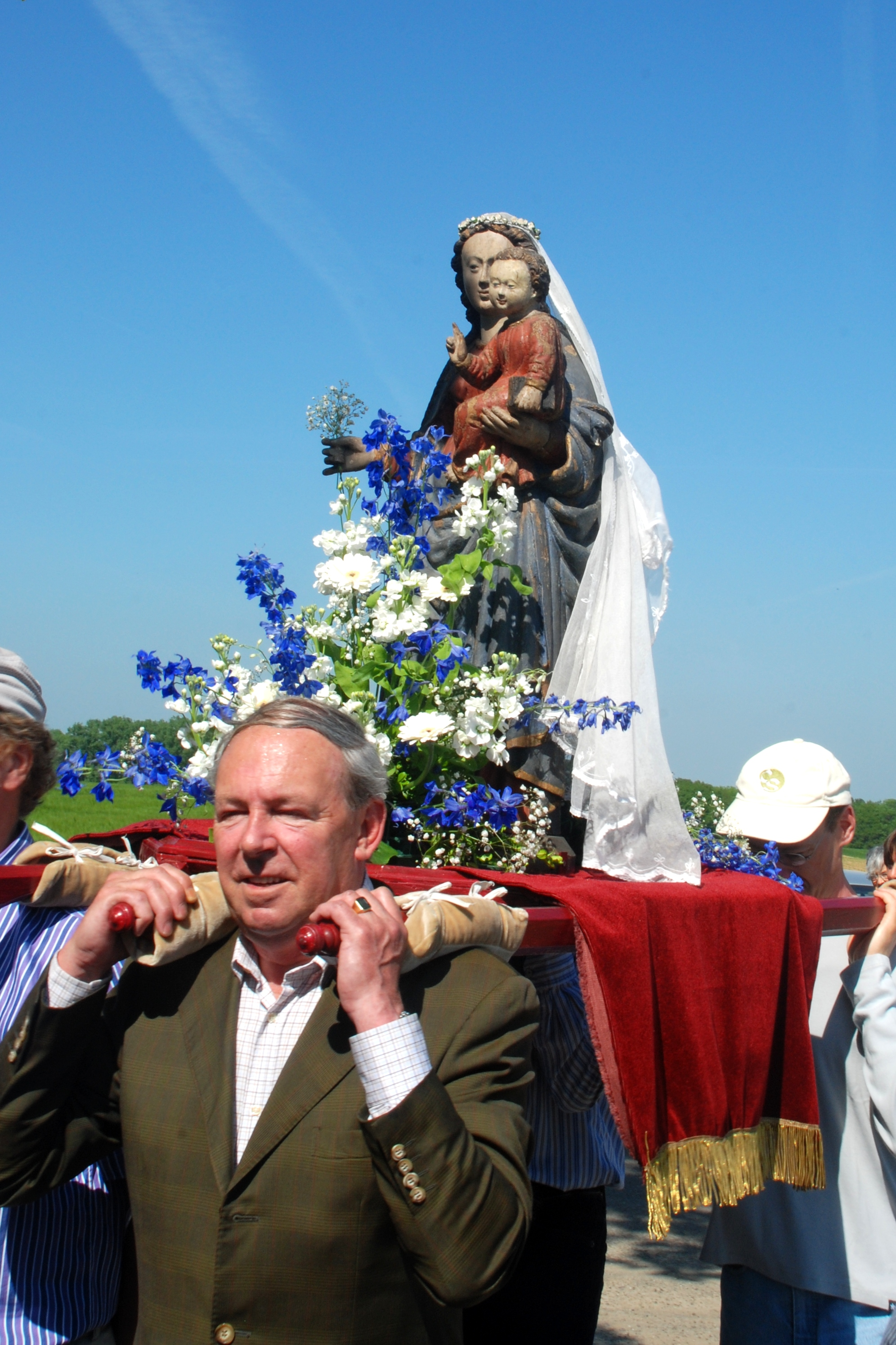 Belgique - Bousval - Chapelle du Try-au-Chêne - Procession de la Pentecôte